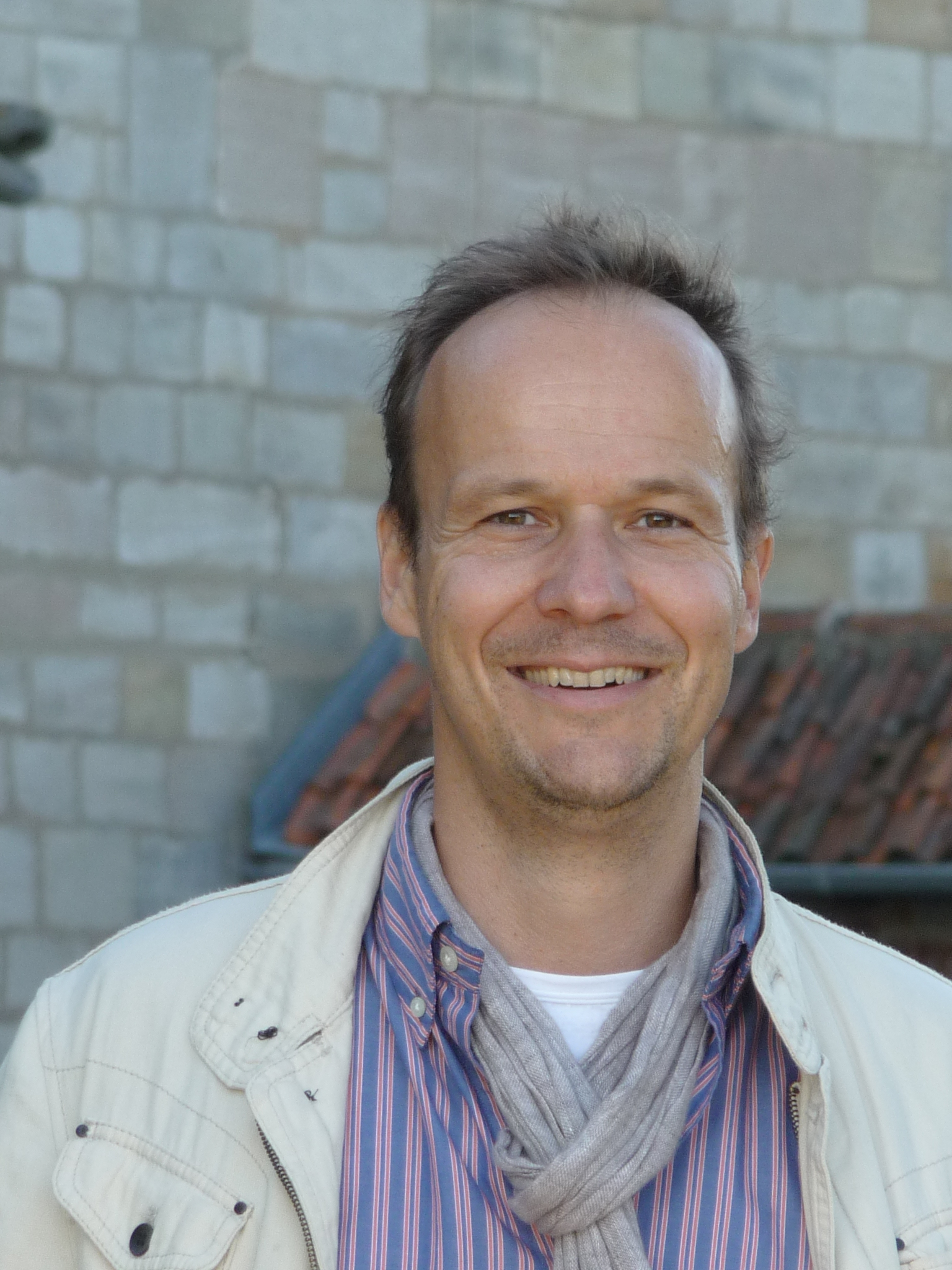 Deutscher Opernsänger Christoph Strehl, Tenor